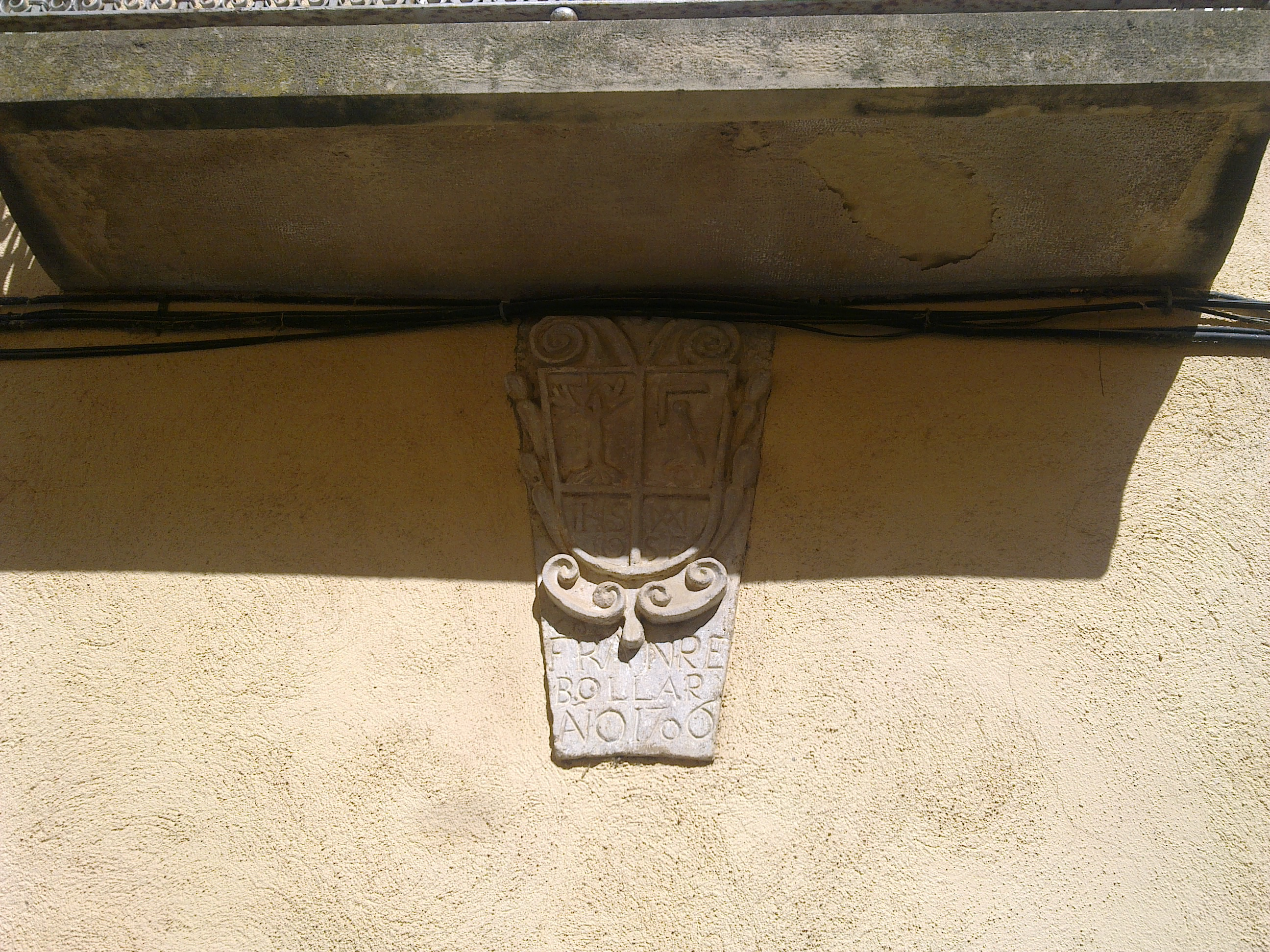 Escut de Ca Martí o Escut de Casa Poquet